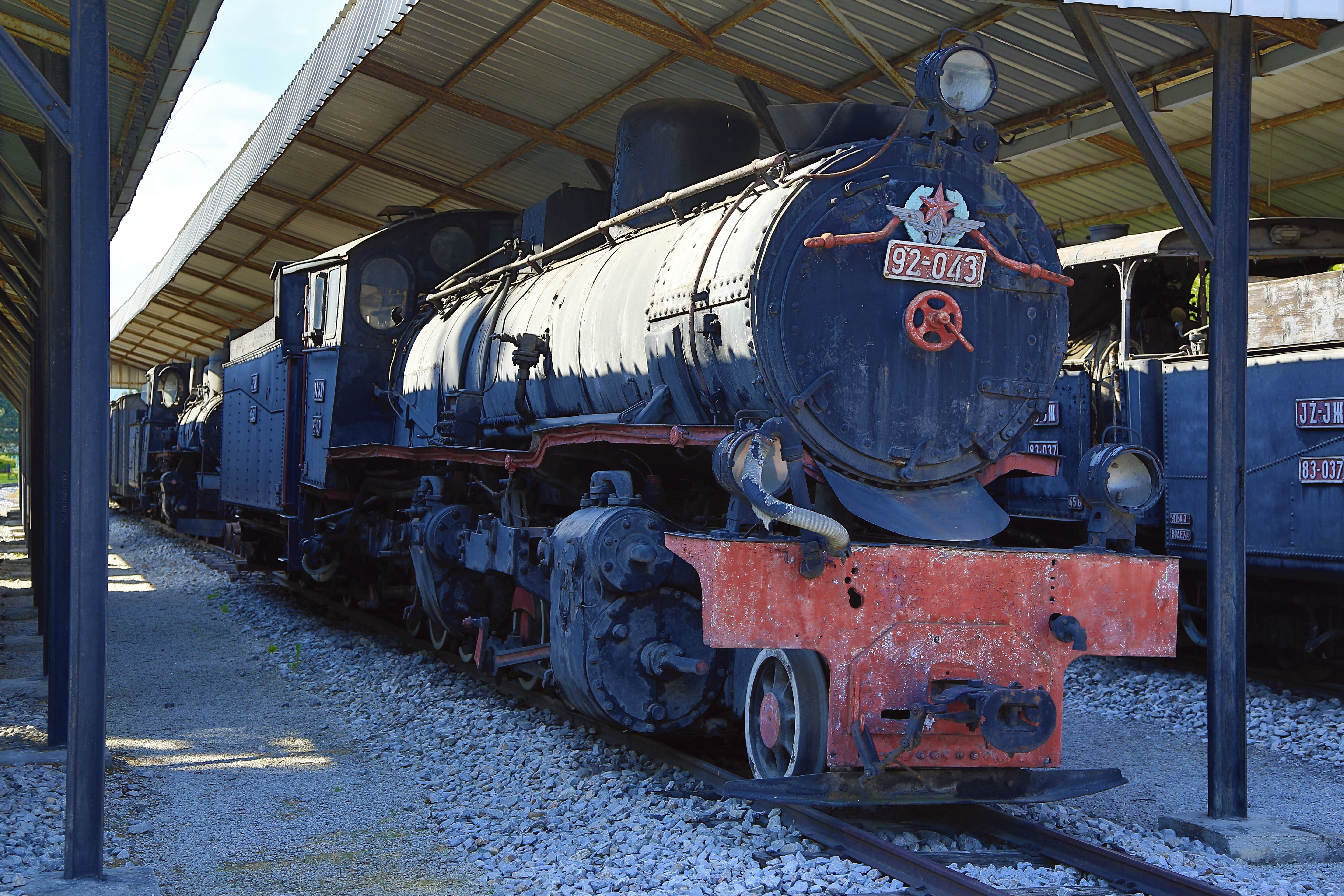 Mallet-Schlepptenderlokomotive mit der Achsfolge (1’C)C h4v, möglicherweise die größte Dampflokomotivbauart der jugoslawischen Schmalspurstrecken. Das Kopfstück macht den Eindruck, dass der Ausgleichshebel der Bosna-Kupplung nachträglich nach außen verlegt wurde. Auch die vergleichsweise spät gebaute Lokomotive ist für den Wagenzug nur mit Saugluftbremsen ausgerüstet.